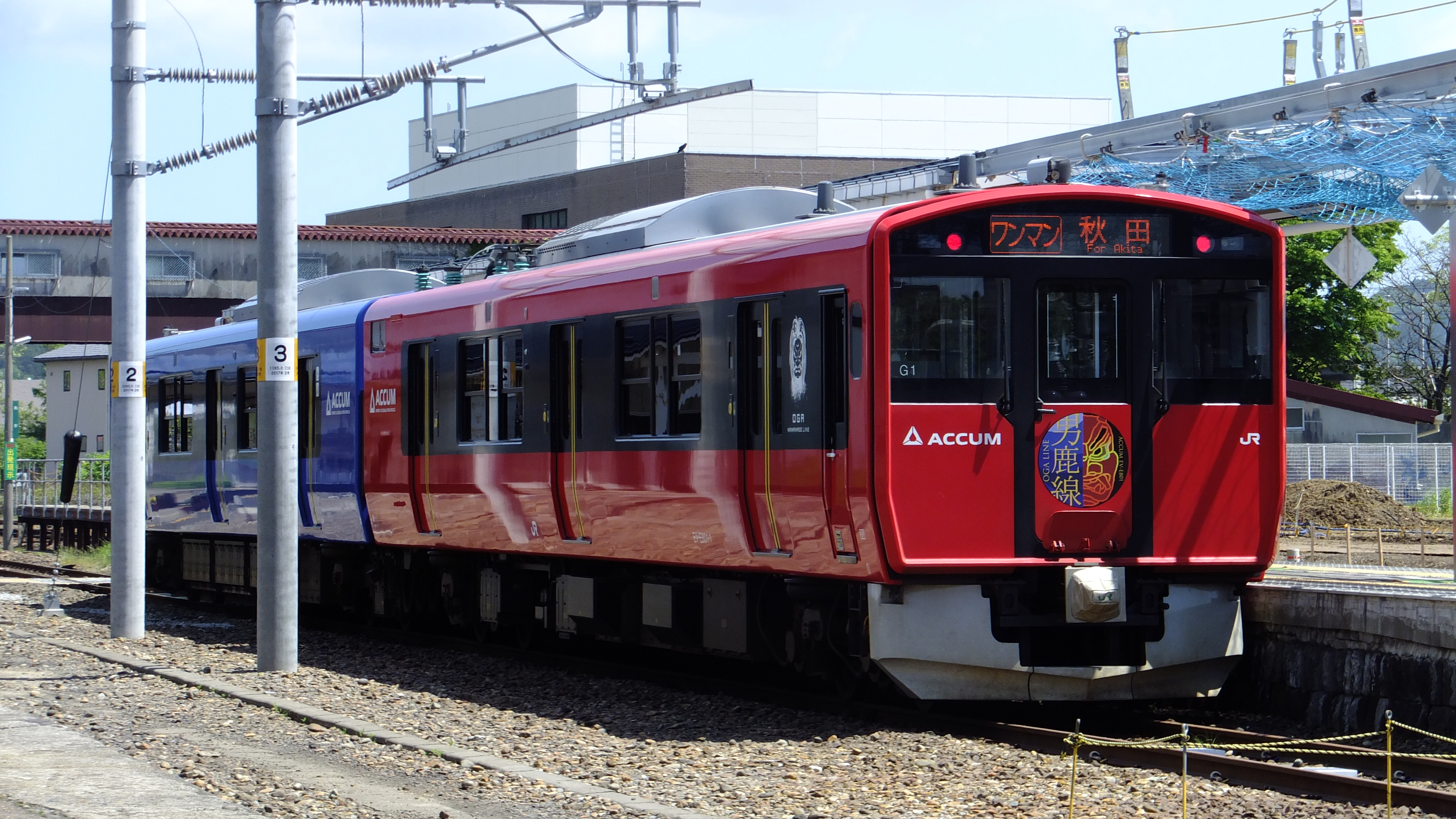 男鹿駅に停車中のEV-E801系。本形式の導入にあたって全線非電化の男鹿線では男鹿駅に給電設備が設けられ、停車中に剛体架線からパンタグラフで受電する。